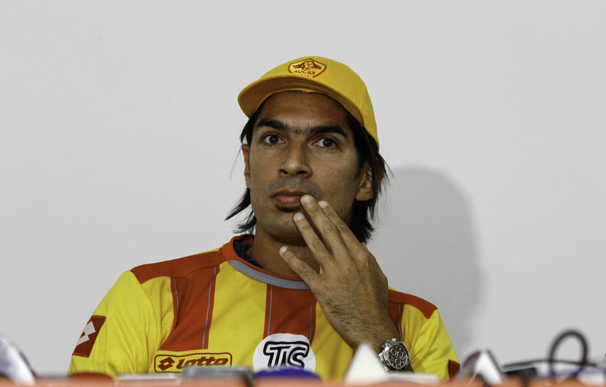 Quito, 17 mar (ANDES).- El delantero uruguayo Sebastián Abreu es la nueva contratación del Club Sociedad Deportiva Aucas. Foto: Micaela Ayala V./ANDES